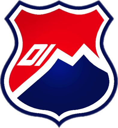 Escudo del Deportivo Independiente Medellín.